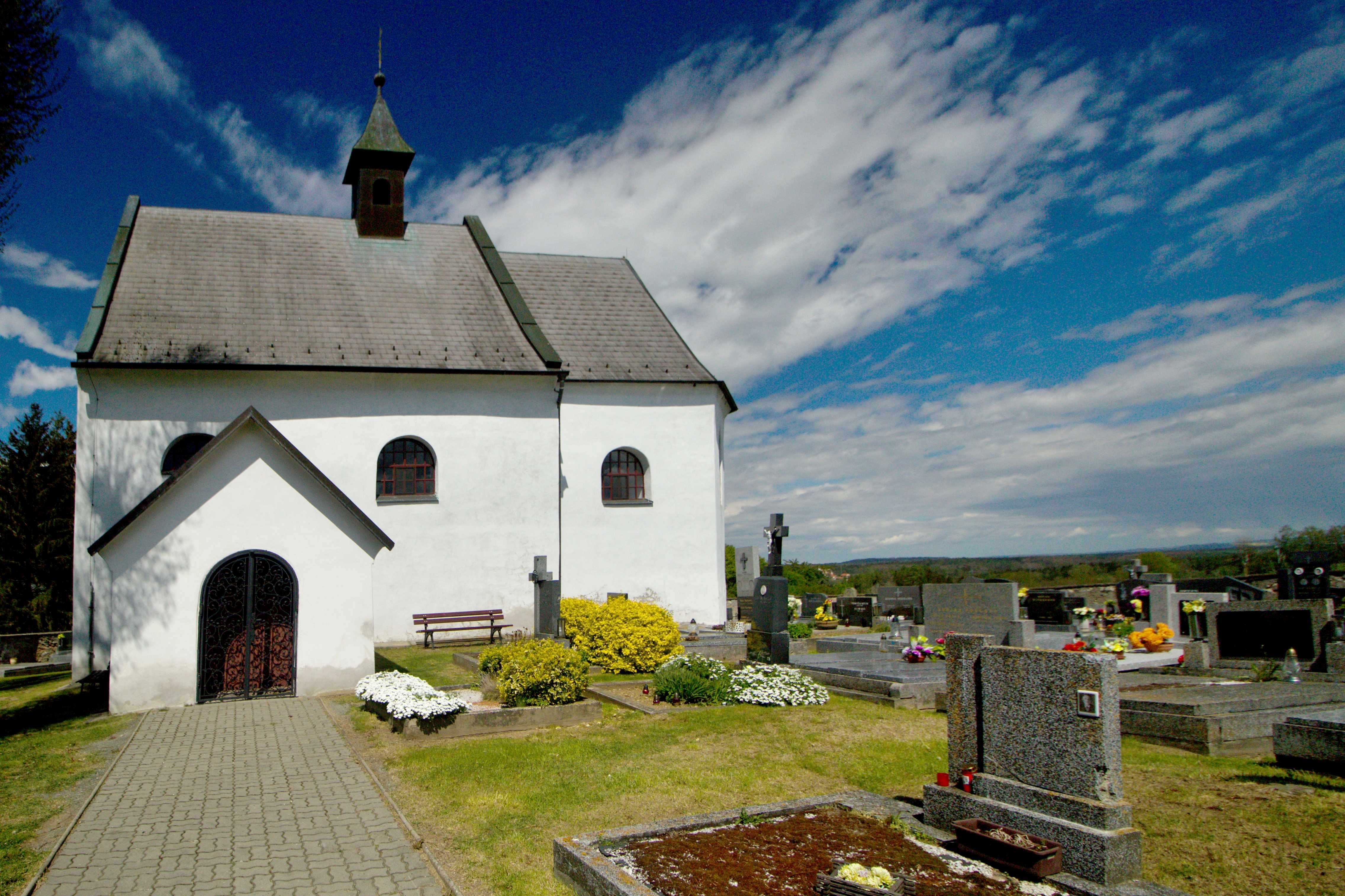 Jeníkov, okres Benešov, kostel sv. Kateřiny